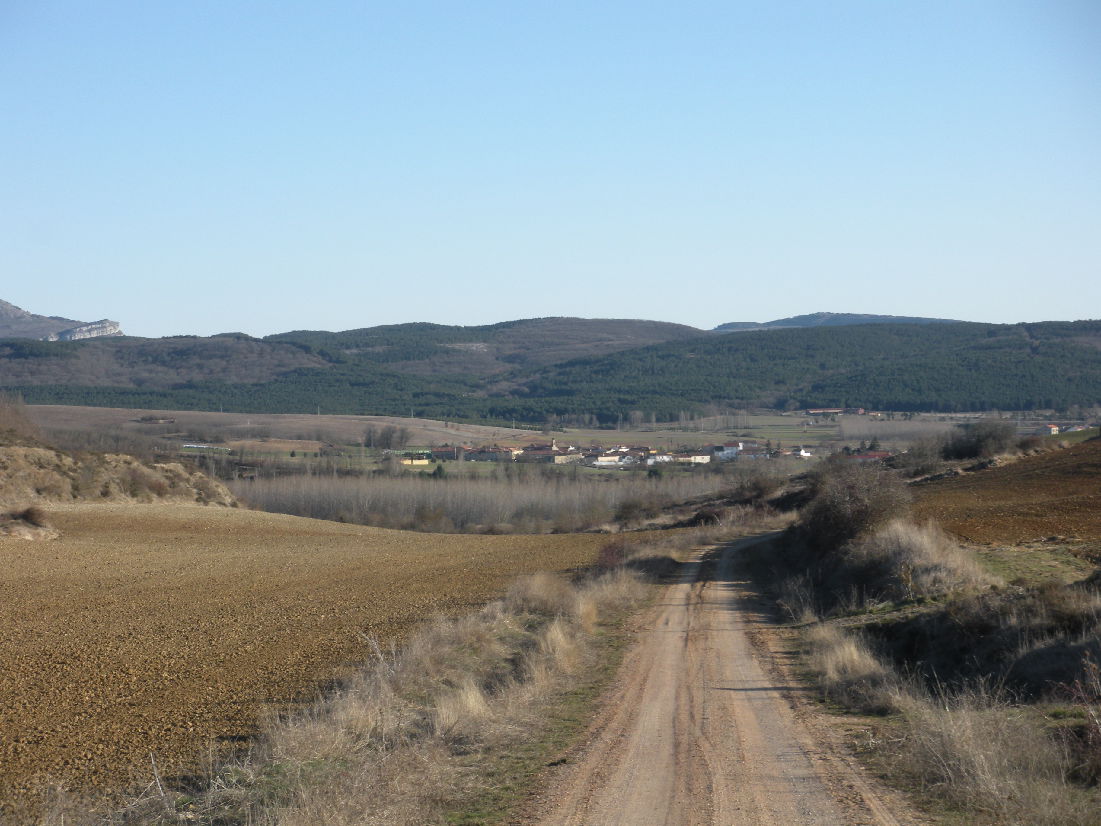 Subida al Monte Cildá, en Olleros de Pisuerga, España.